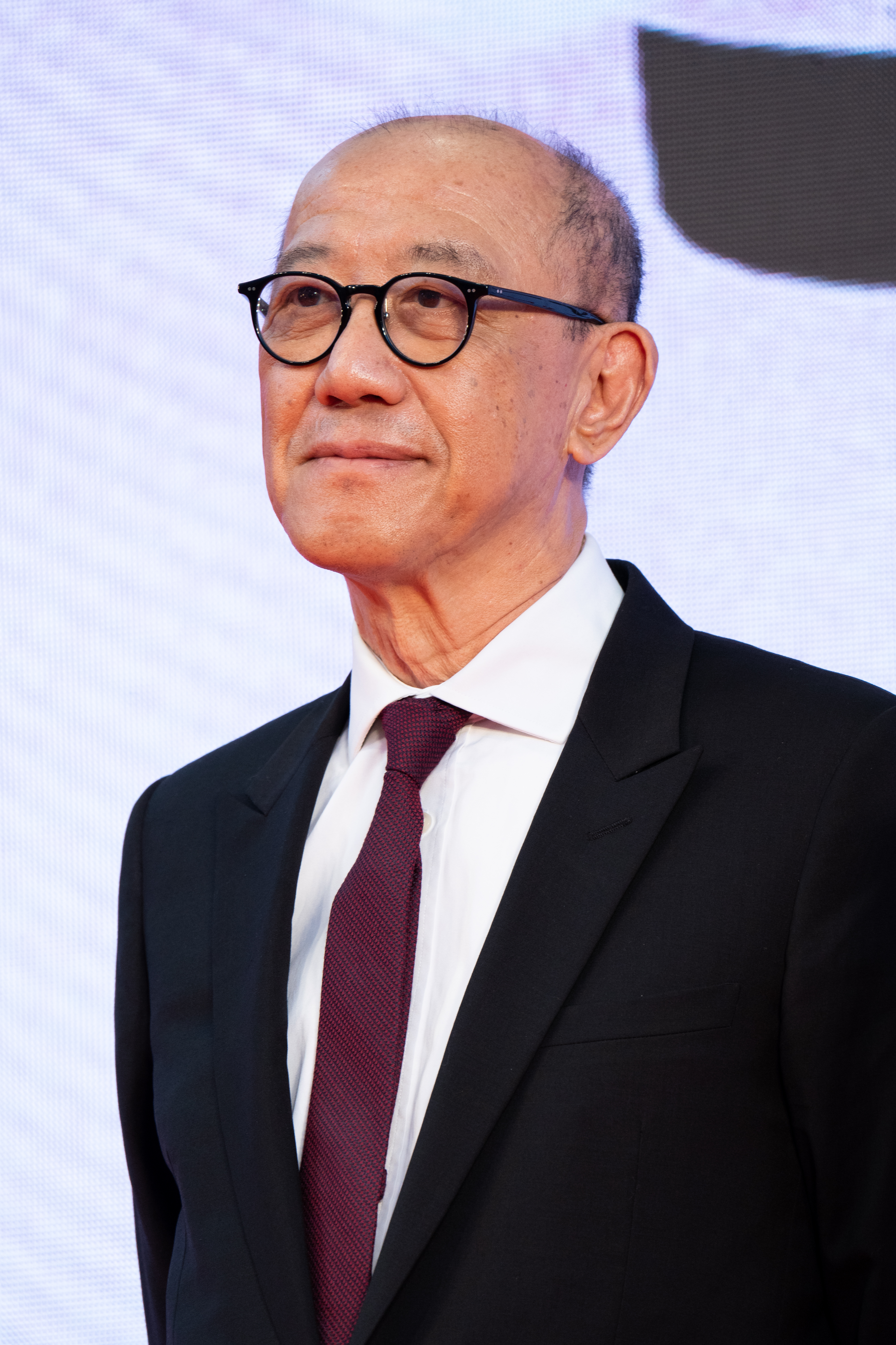 第32回 東京国際映画祭 オープニングセレモニー テレンス・チャン (オーバー・エベレスト 陰謀の氷壁)